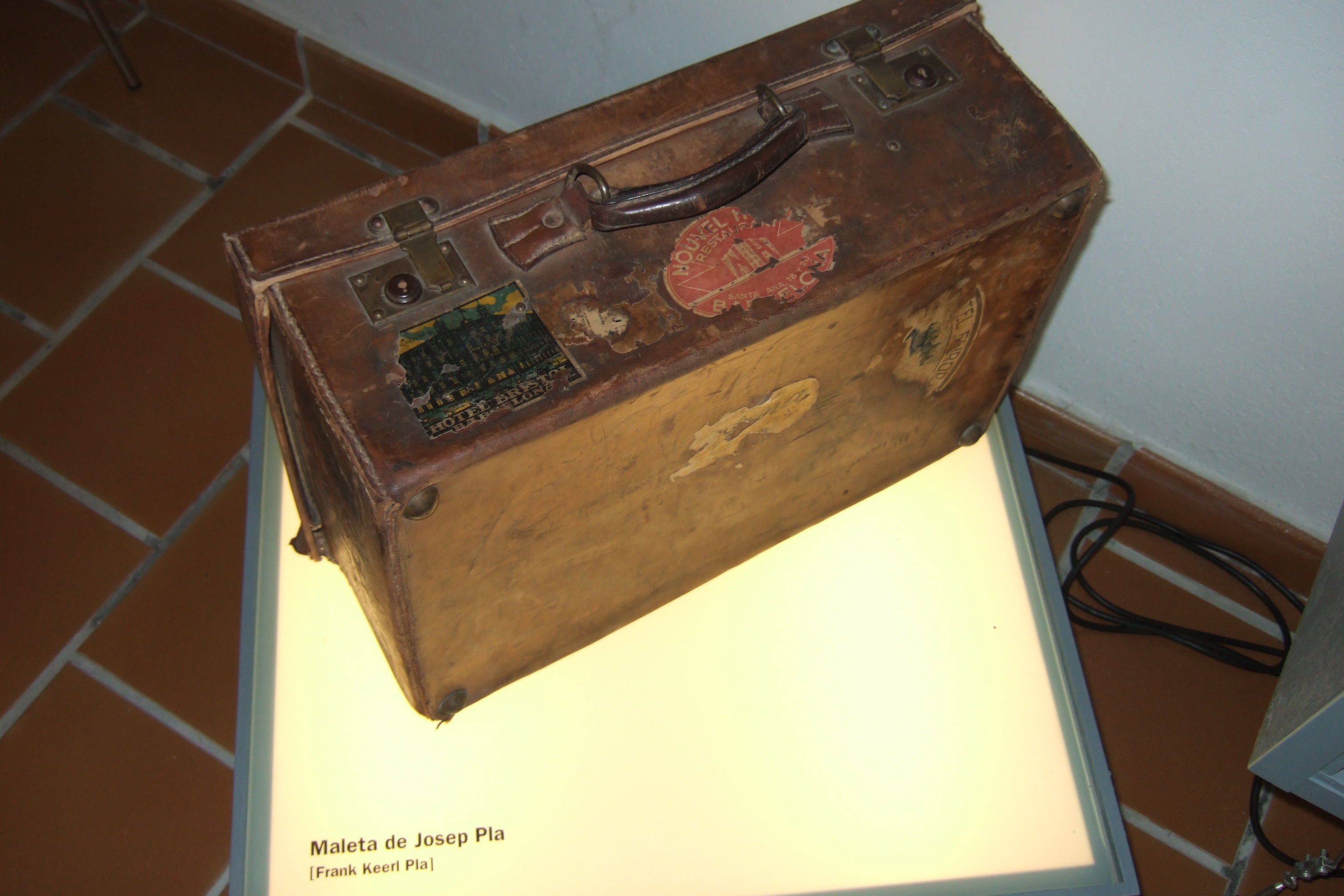 Exposició permanent de la Fundació Josep Pla: Josep Pla (1897 – 1981)